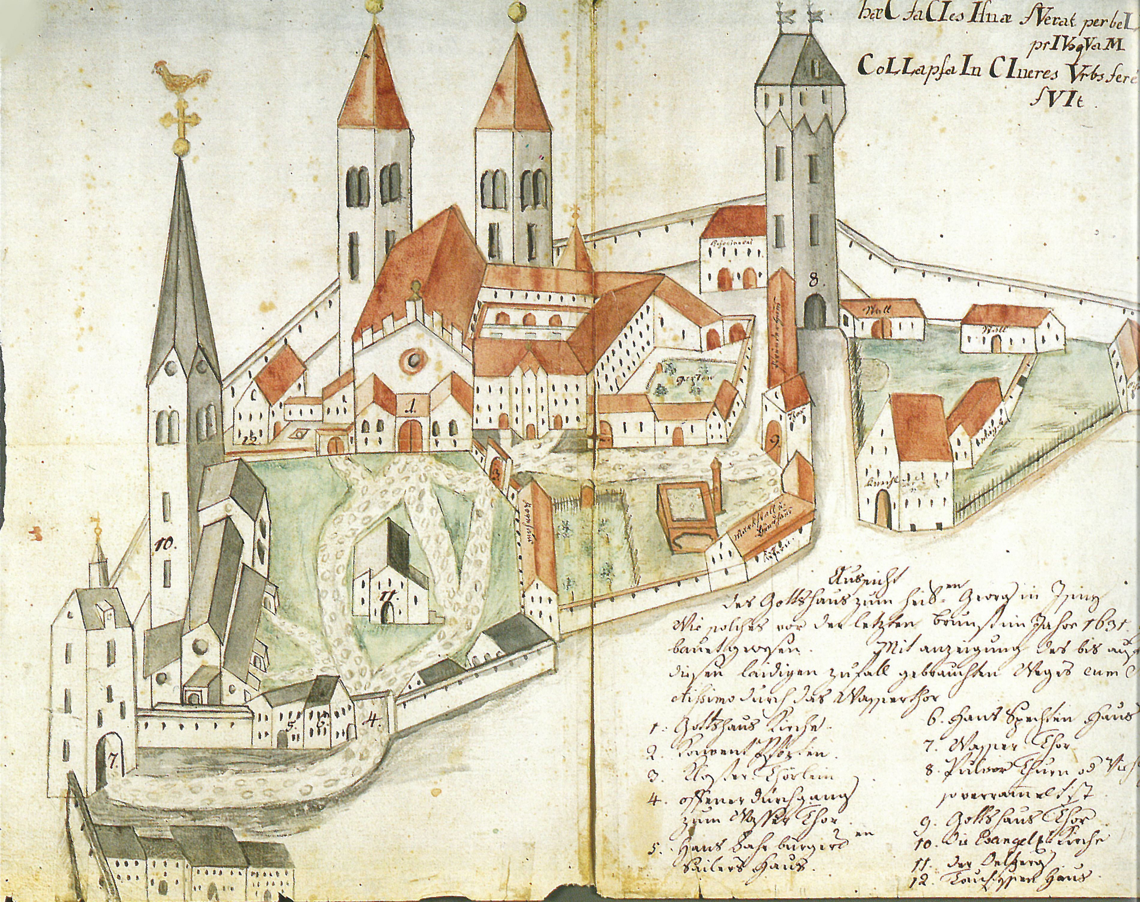 Isny im Allgäu, geistlicher Bezirk mit ev. Nikolaikirche und dem kath. Kloster St. Georg; vor dem Brand von 1631; doppelseitige Vedute in der Klosterchronik; die klostereigenen Gebäude sind mit roten Dächern hervorgehoben; Klosterarchiv Isny